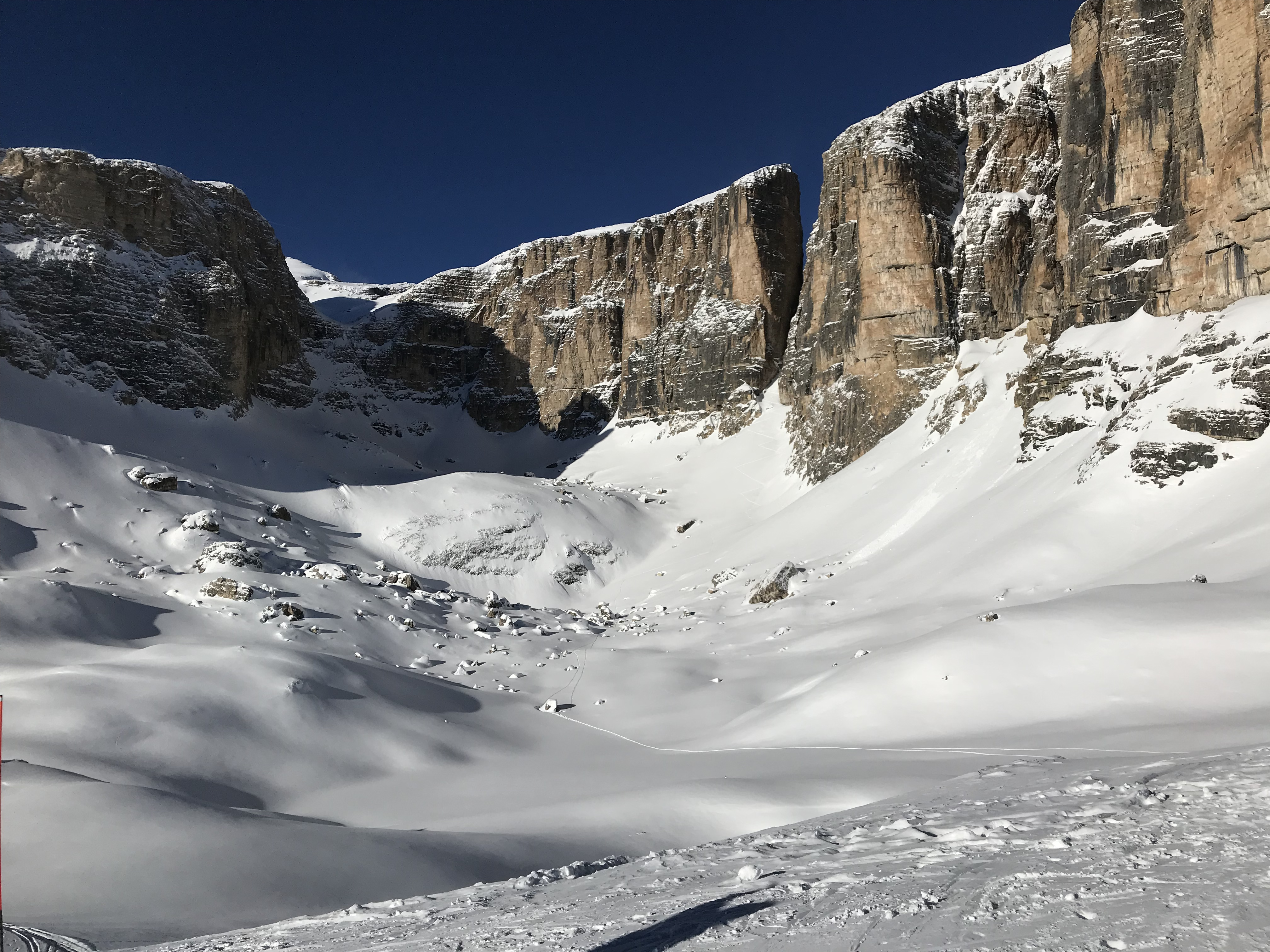 Il Vallon in cima al Boè